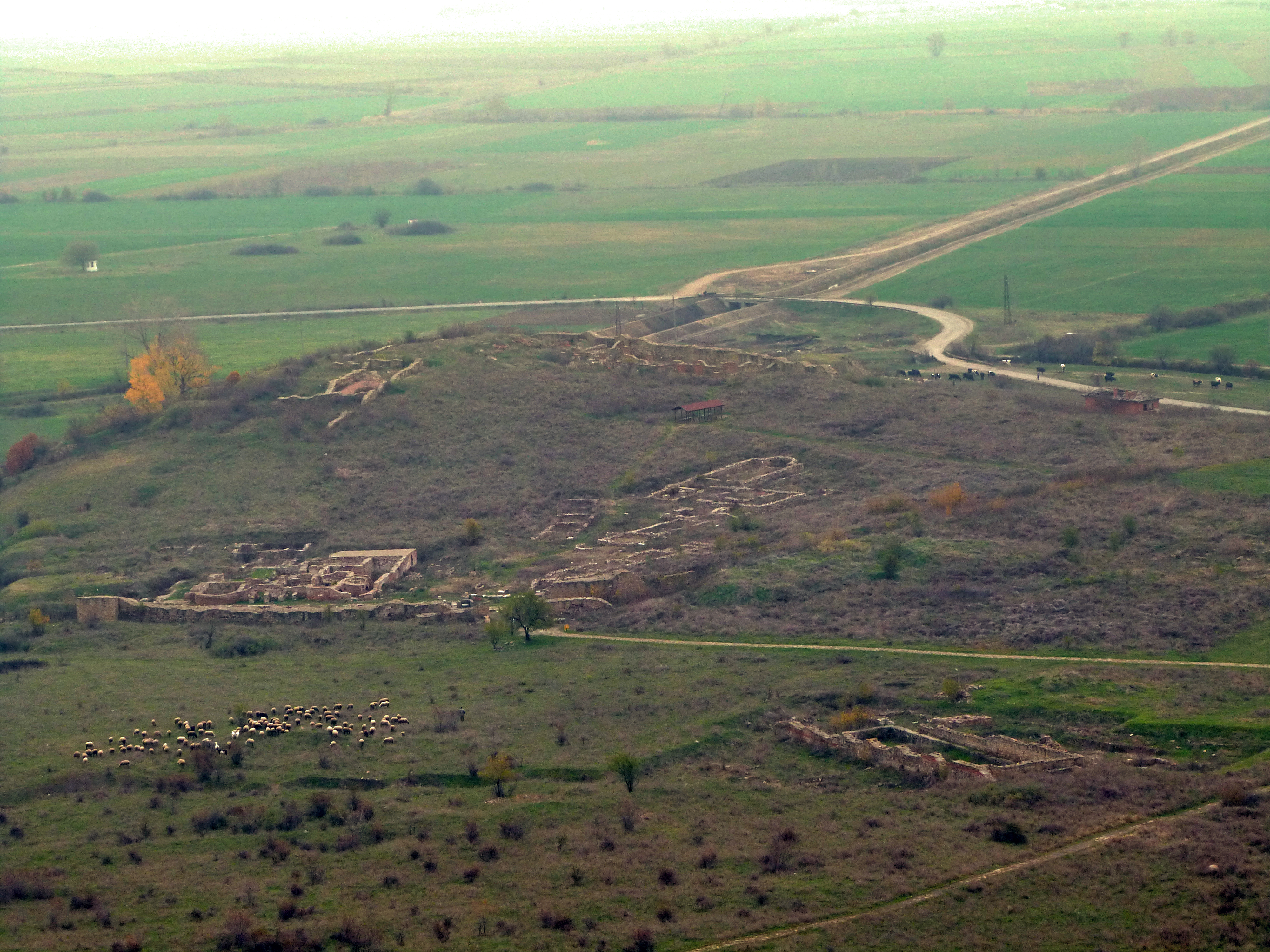 Кабиле